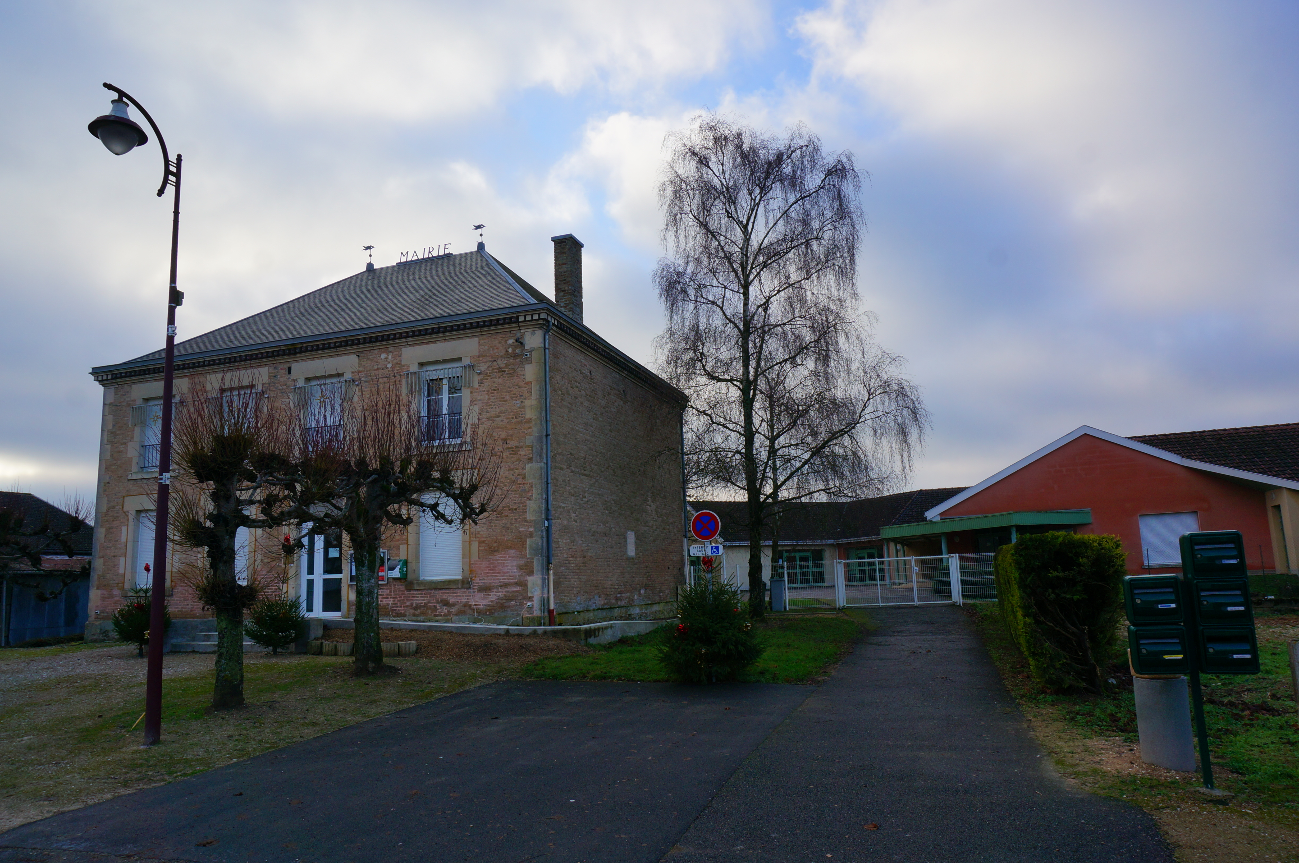 Ripoarisch: à Saint-Remy-sur-Bussy.